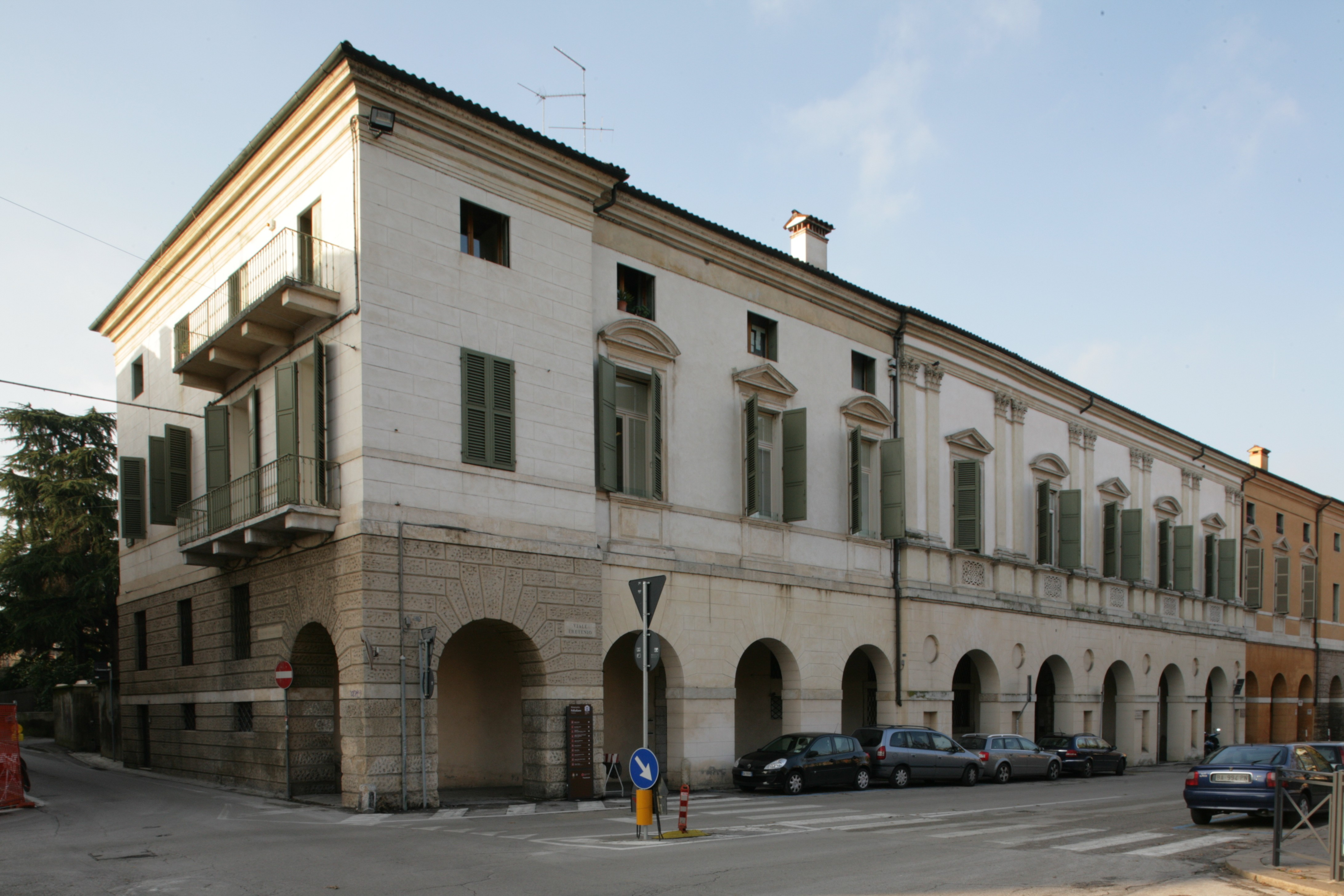 Palazzo Civena in Vicenza, designed by Andrea Palladio